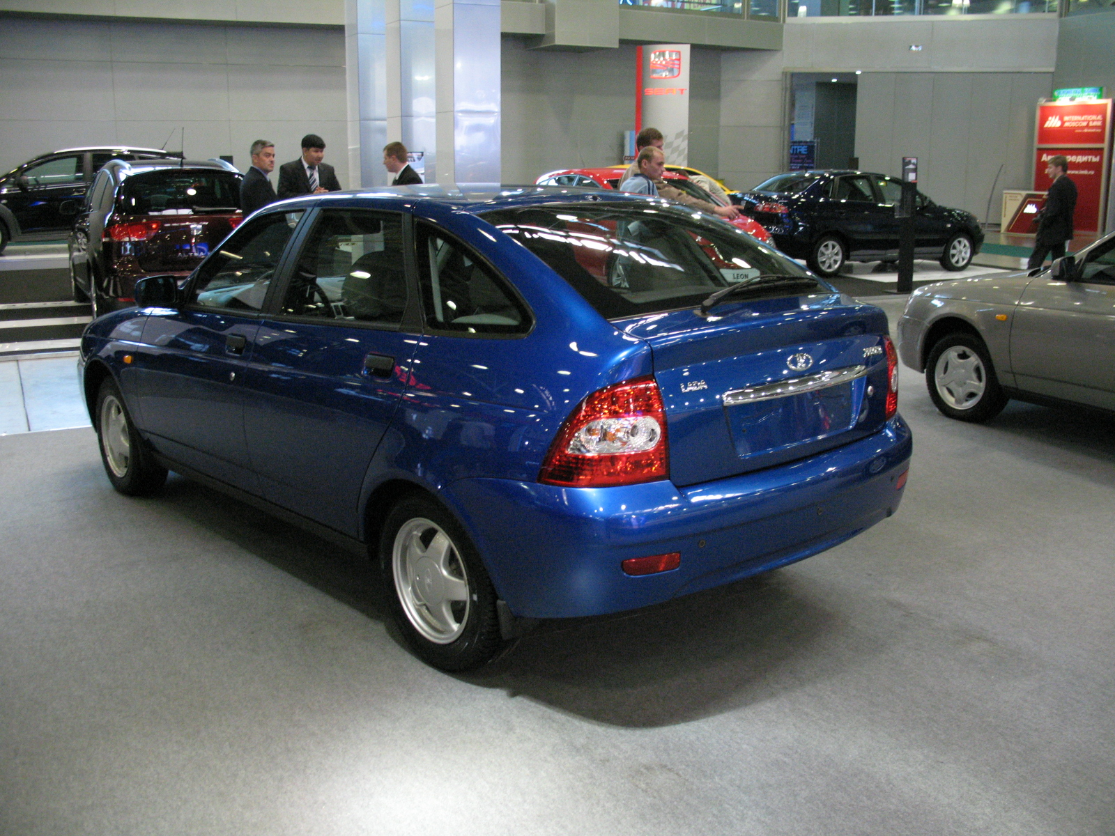 LADA Priora хэтчбек (вид сзади)